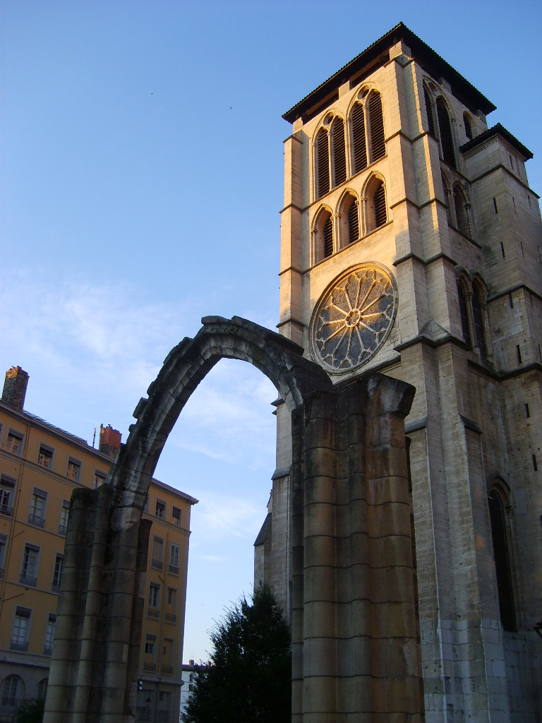 Face nord